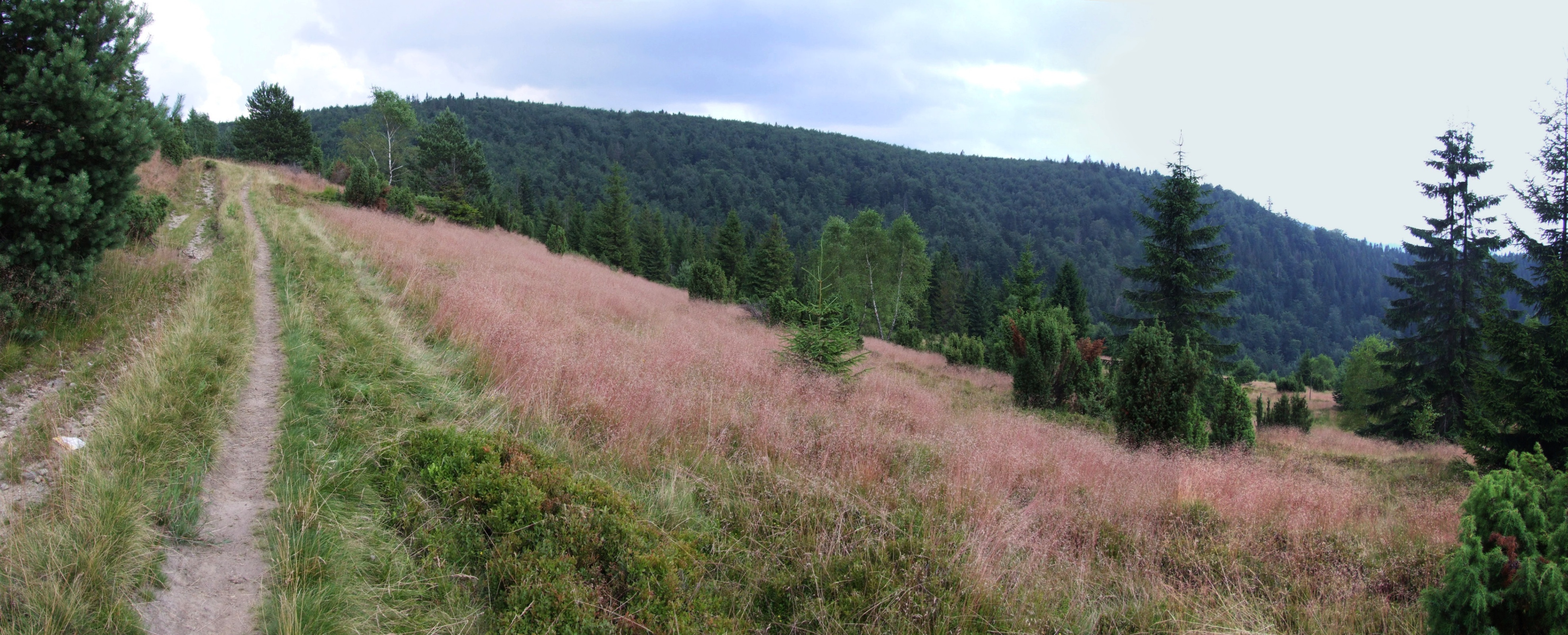 Hala Bukowina w Beskidzie Sądeckim (Pasmo Jaworzyny). Widok na grzbiet Hali Pisanej